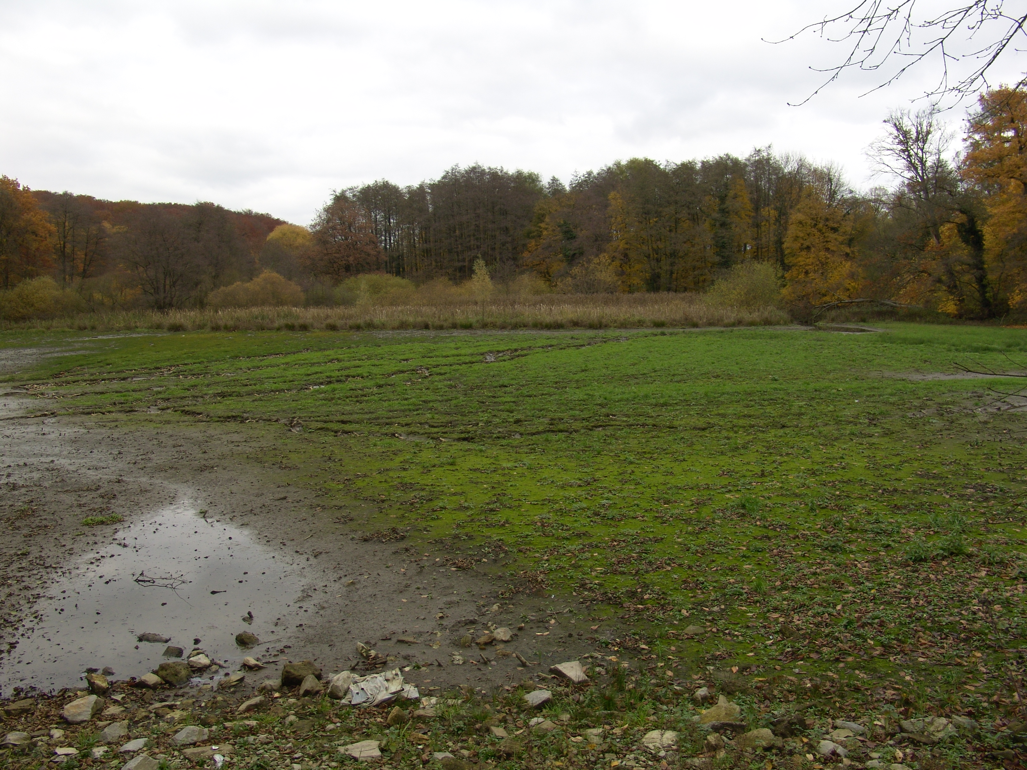 Der abgelassene Aprather Mühlenteich im Herbst 2007